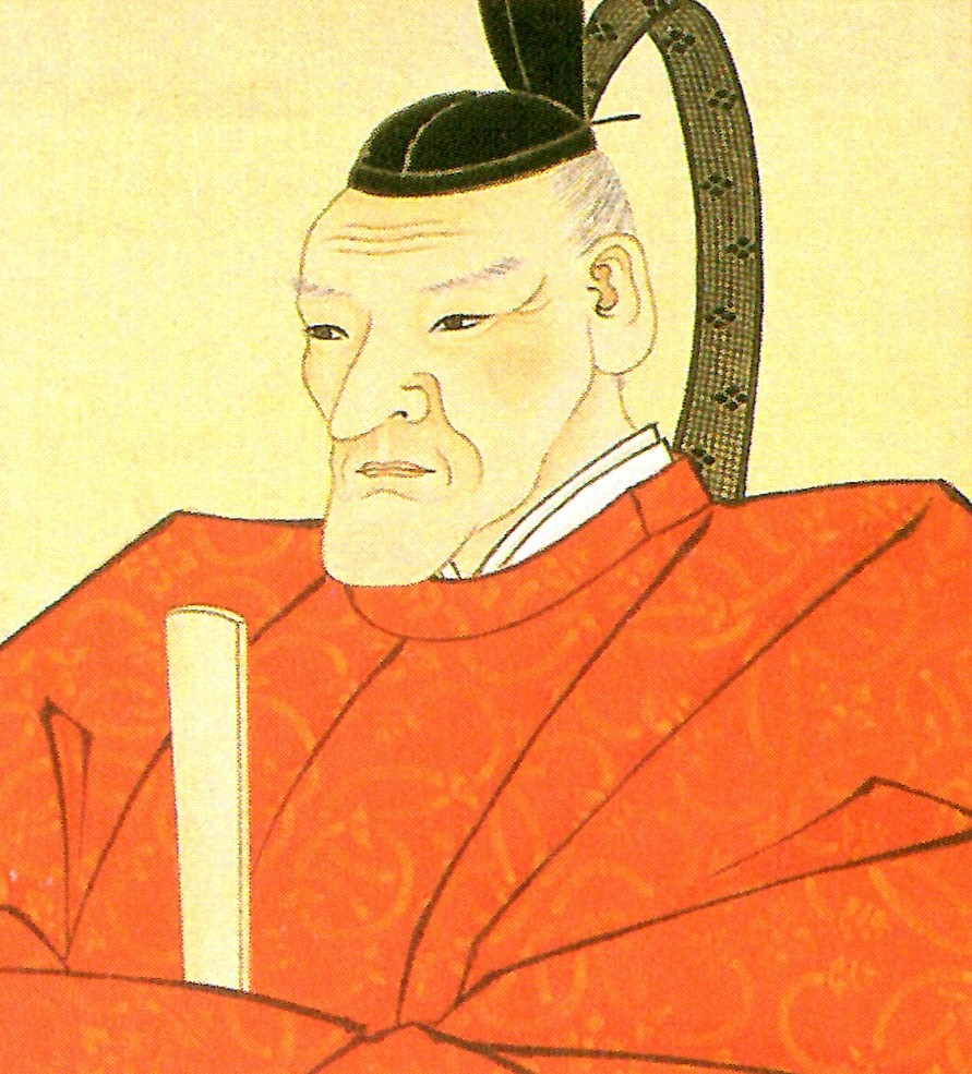 遠山友随の肖像。